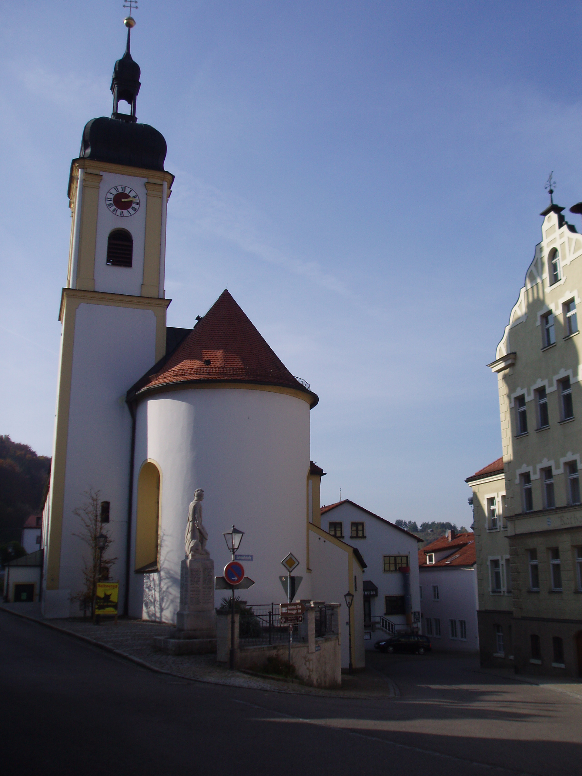 Altmannstein im Landkreis Eichstätt, Pfarrkirche und Rathaus